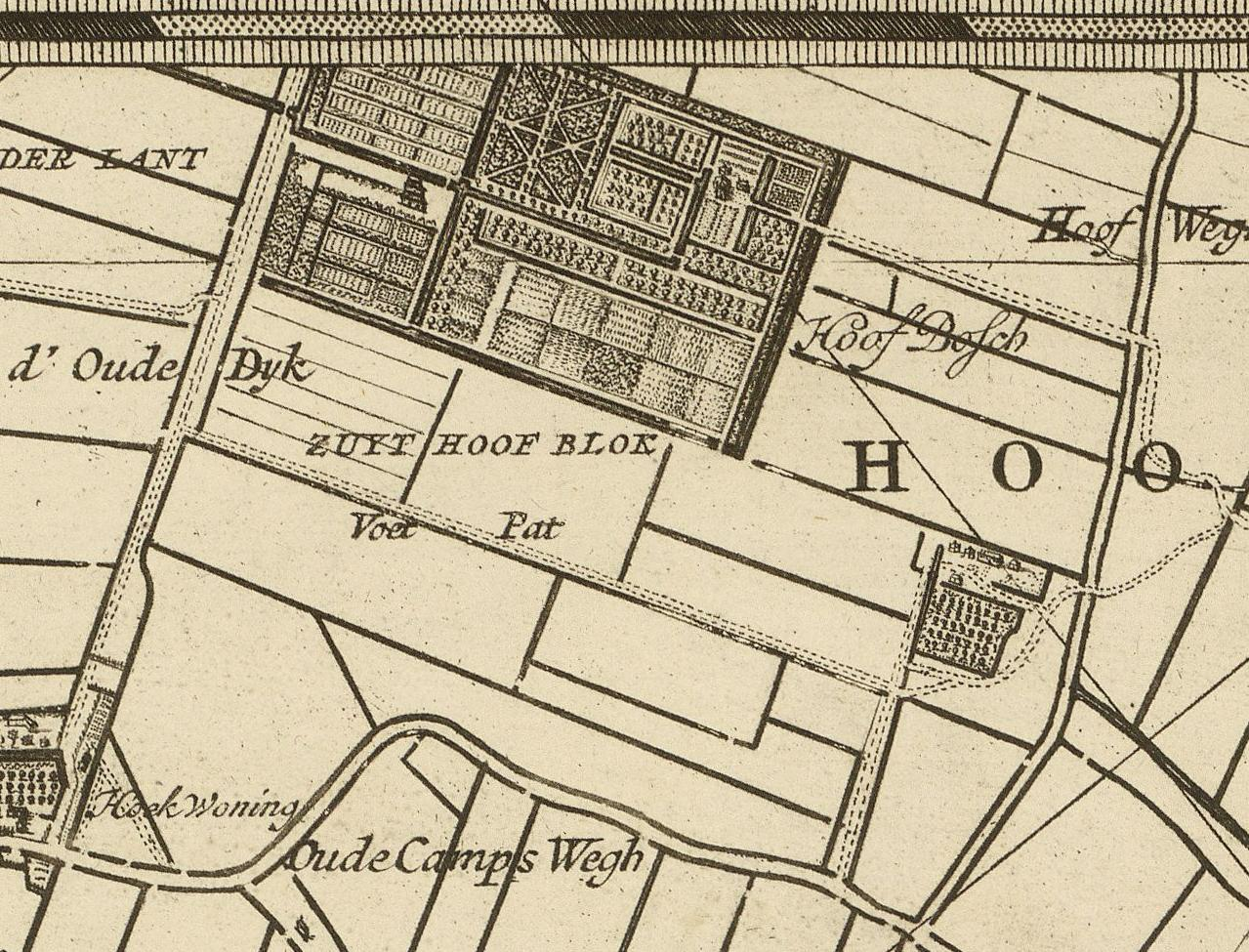 Kaart van het hoogheemraadschap van Delfland, gemeten door de landmeters Nicolaas en Joacobus Kruchius. Afgebeeld is buitenplaats Hoofbosch in De Lier, Zuid-Holland.